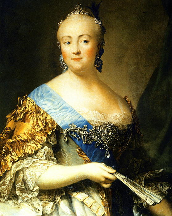 «Портрет императрицы Елизаветы Петровны» 1757 Холст, масло ГМЗ Царское Село